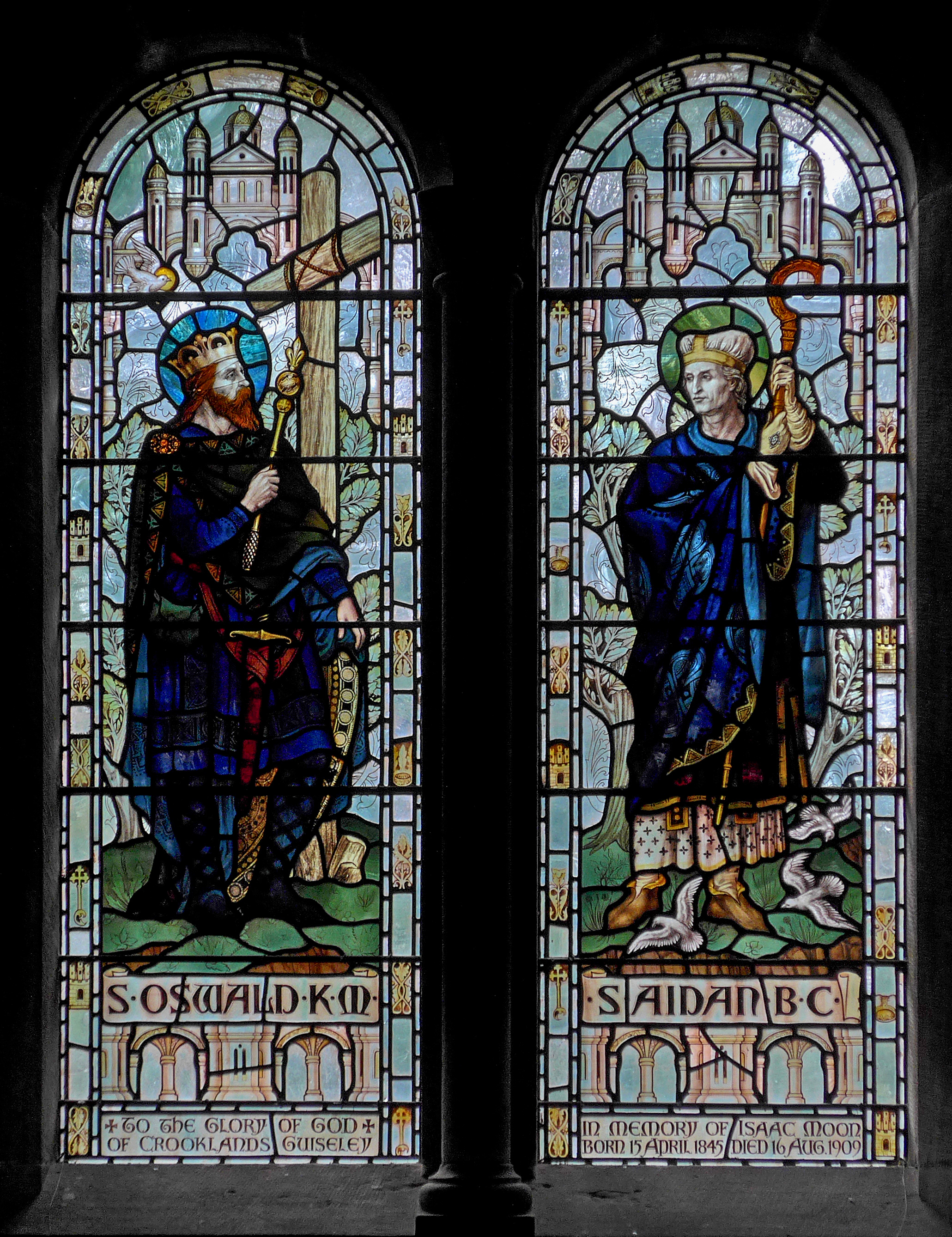 Guiseley